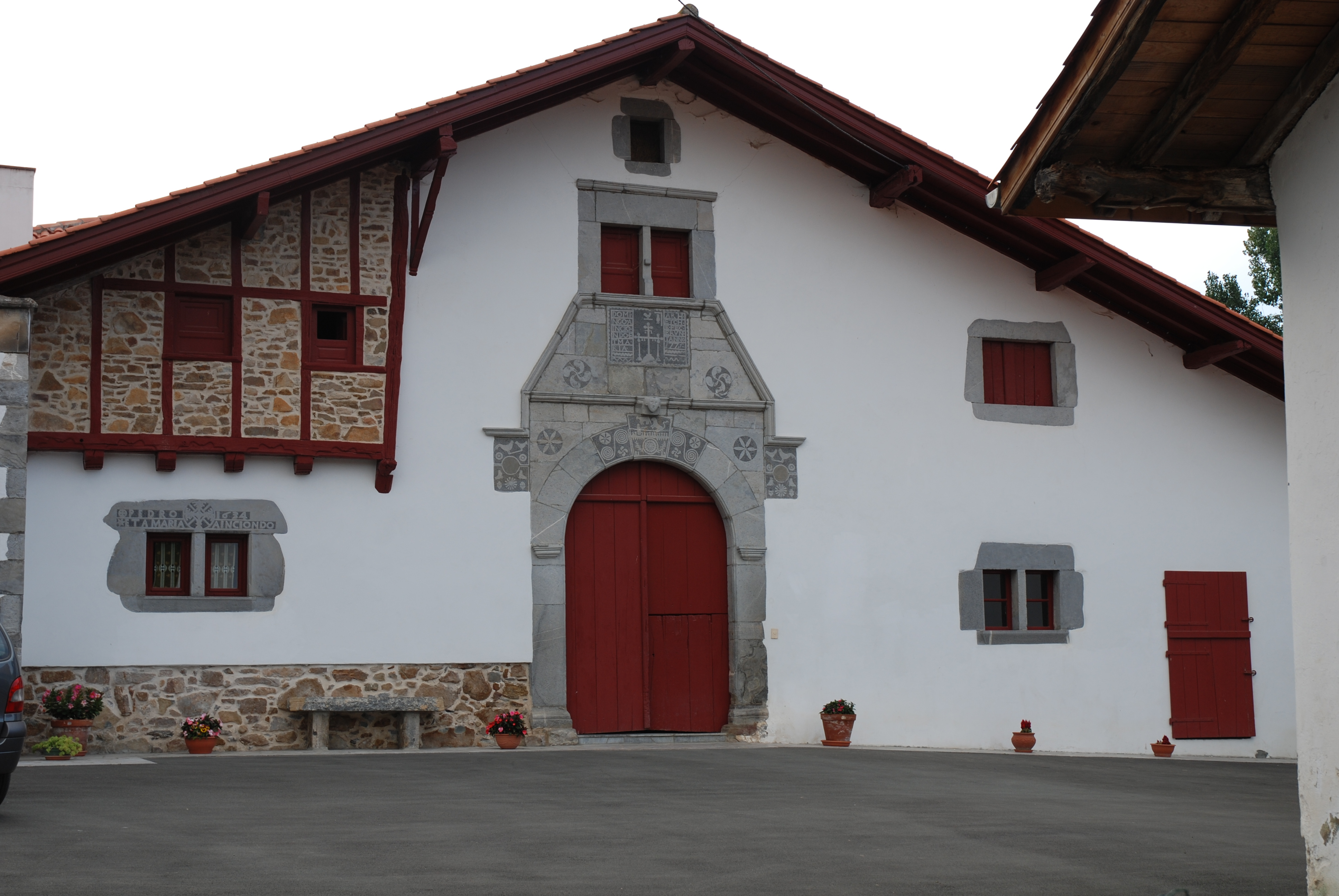 Armendarits, maison de Basse-Navarre